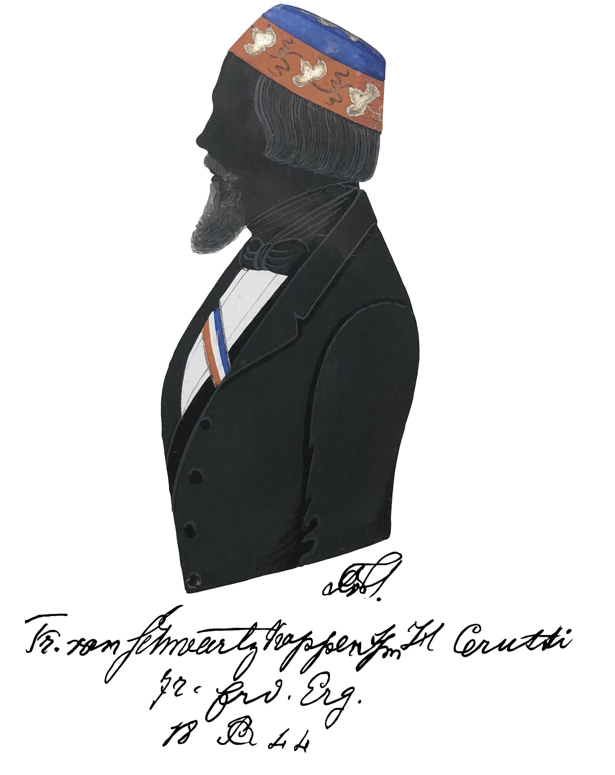 Silhouette von Friedrich von Schwartzkoppen